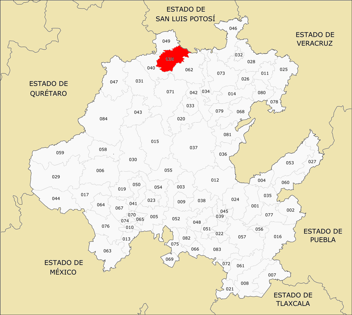 Municipio de Hidalgo